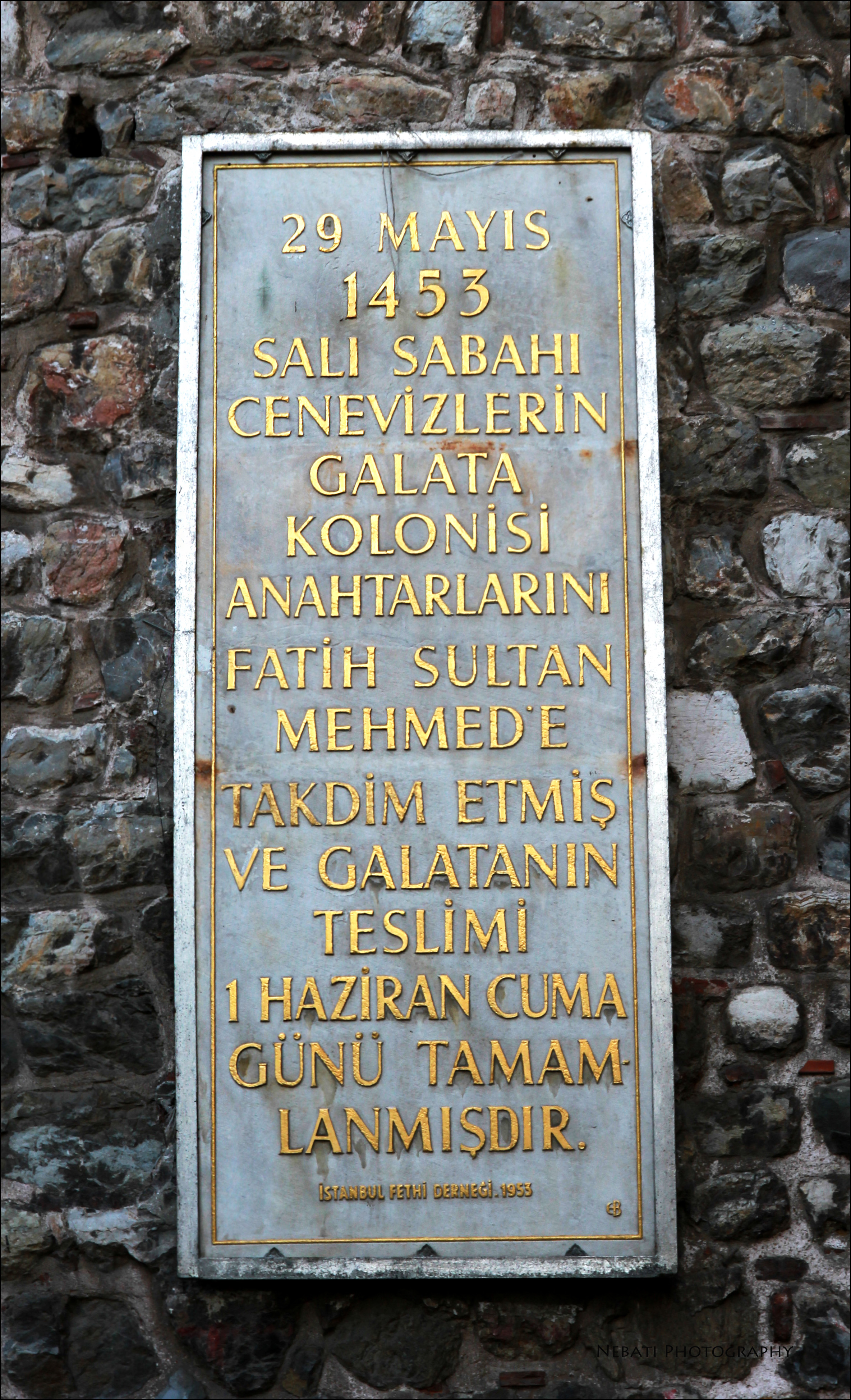 Вывеска на Галатской башне, Галата, Galata Tower, Galata kulesi